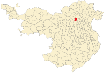 Situación de Vilanant en la provincia de Gerona.